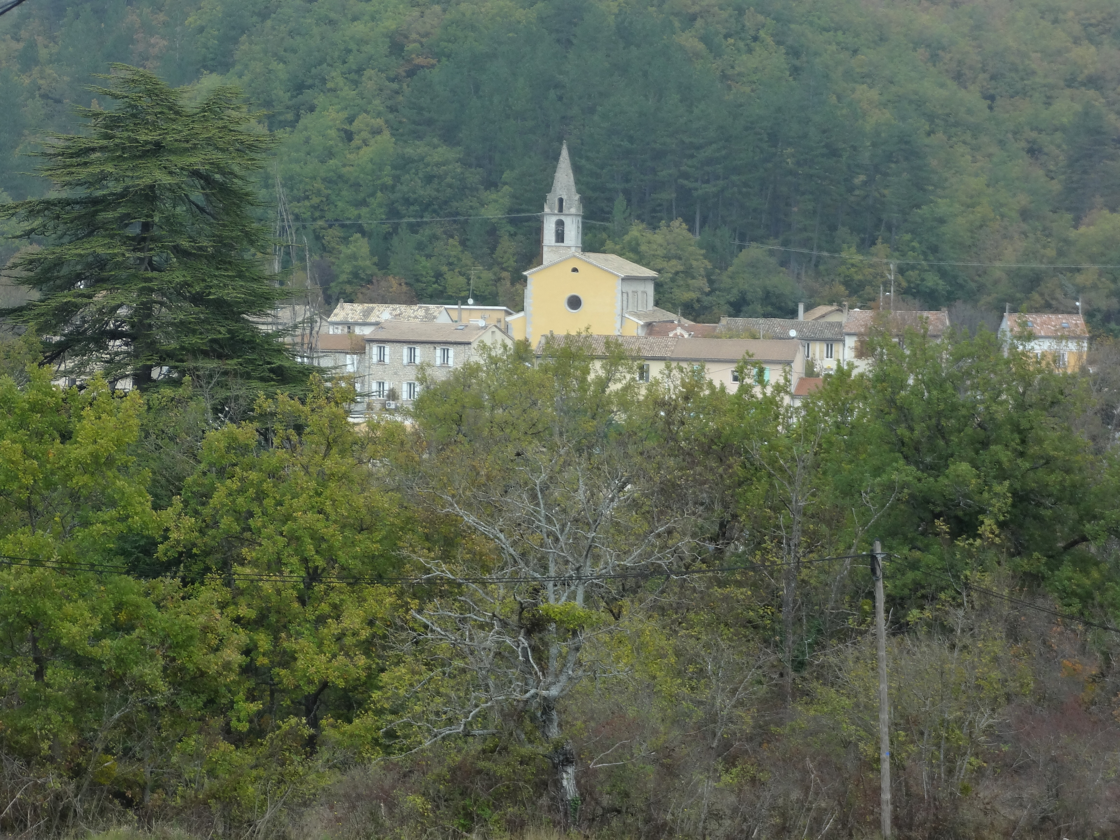 Vue du village de Noyers-sur-Jabron